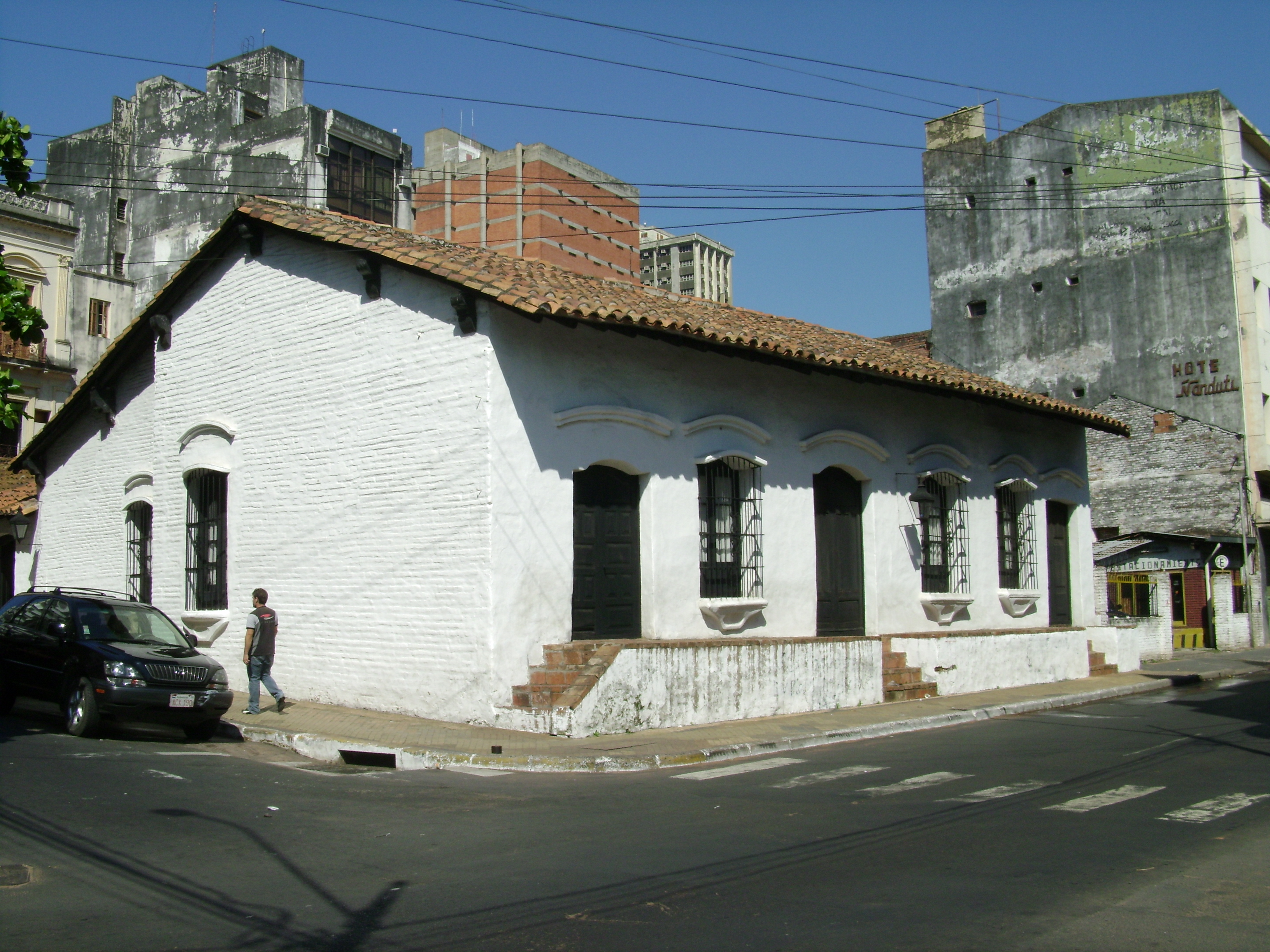 Casa de la independencia